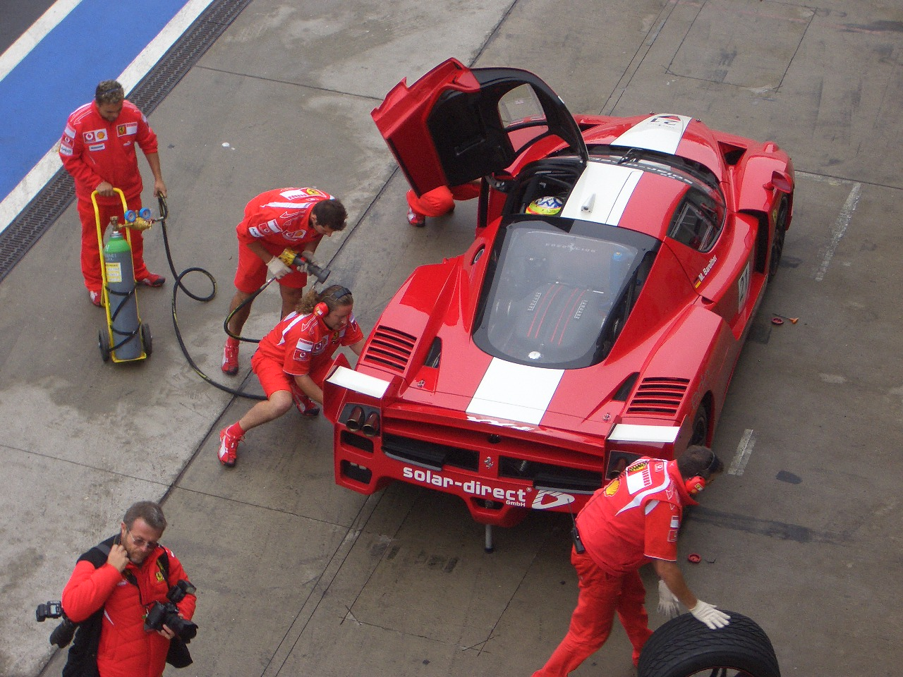 Ferrari-Racing-Day`s 2006, Nürburgring,FXX-Box